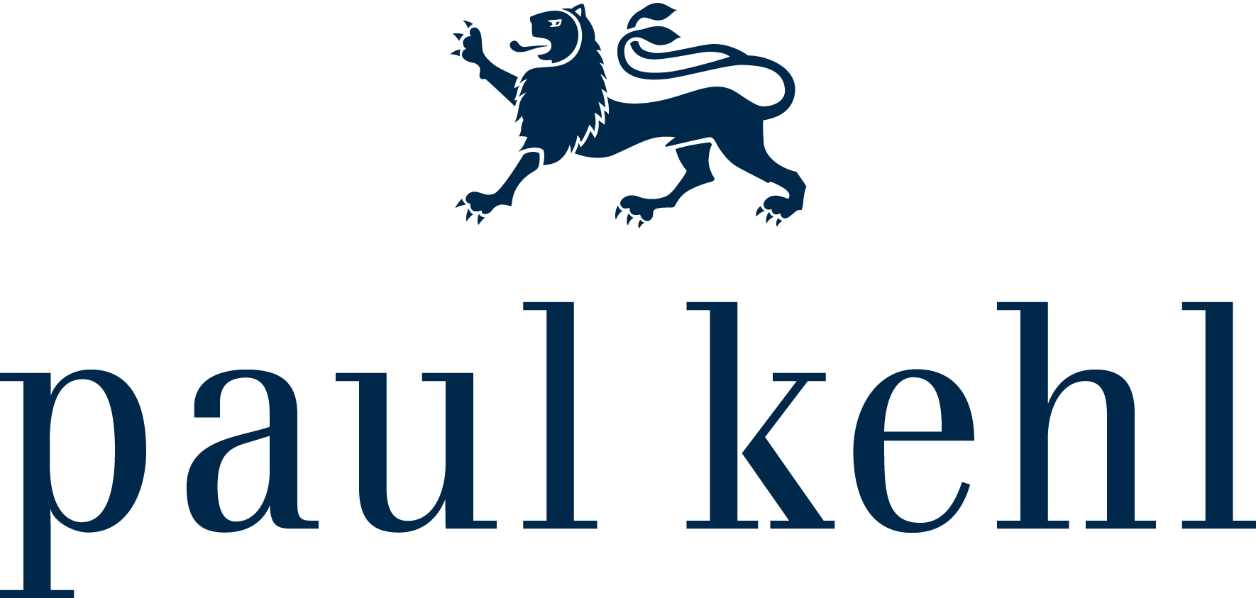 Paul Kehl Logo